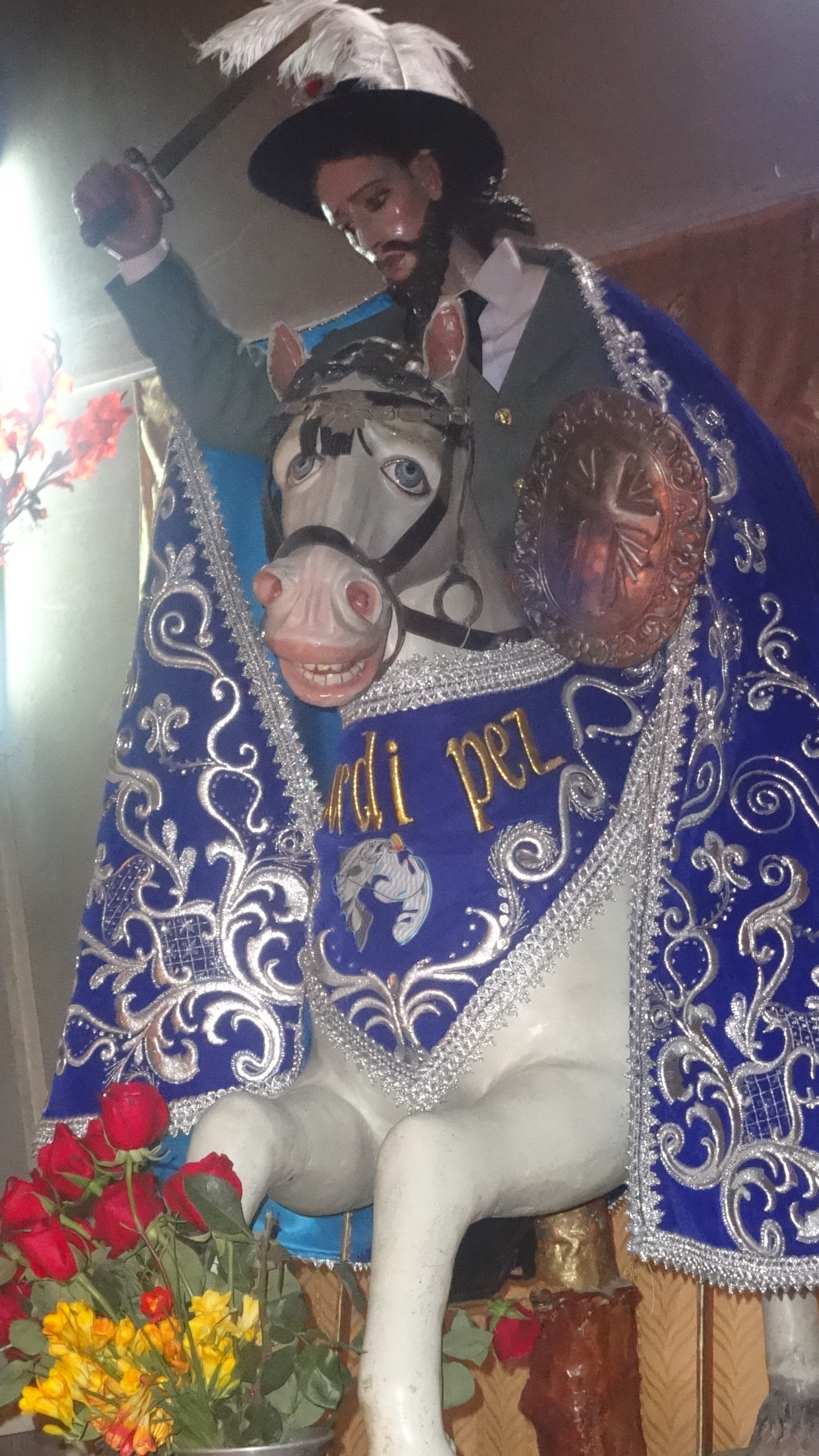 Imagen y representacion Santiago de El Paso